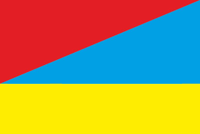 Прапор села Котловина (Ренійський район)